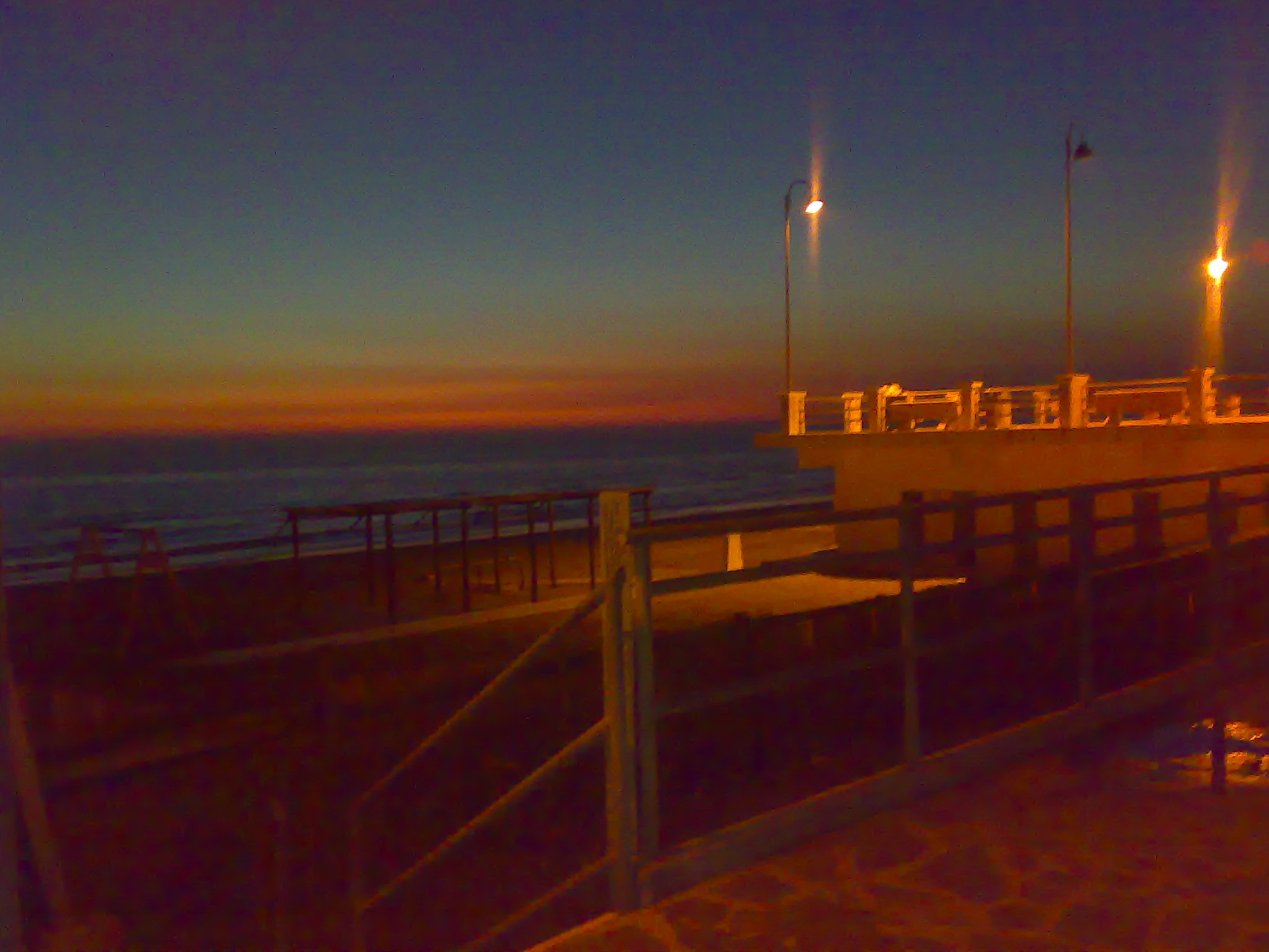 Foto scattata da me con il mio cellulare